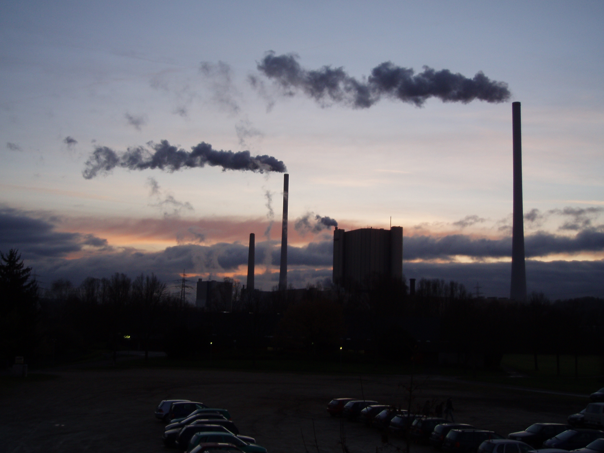 Altbach, Kraftwerk, von Zell aus gesehen